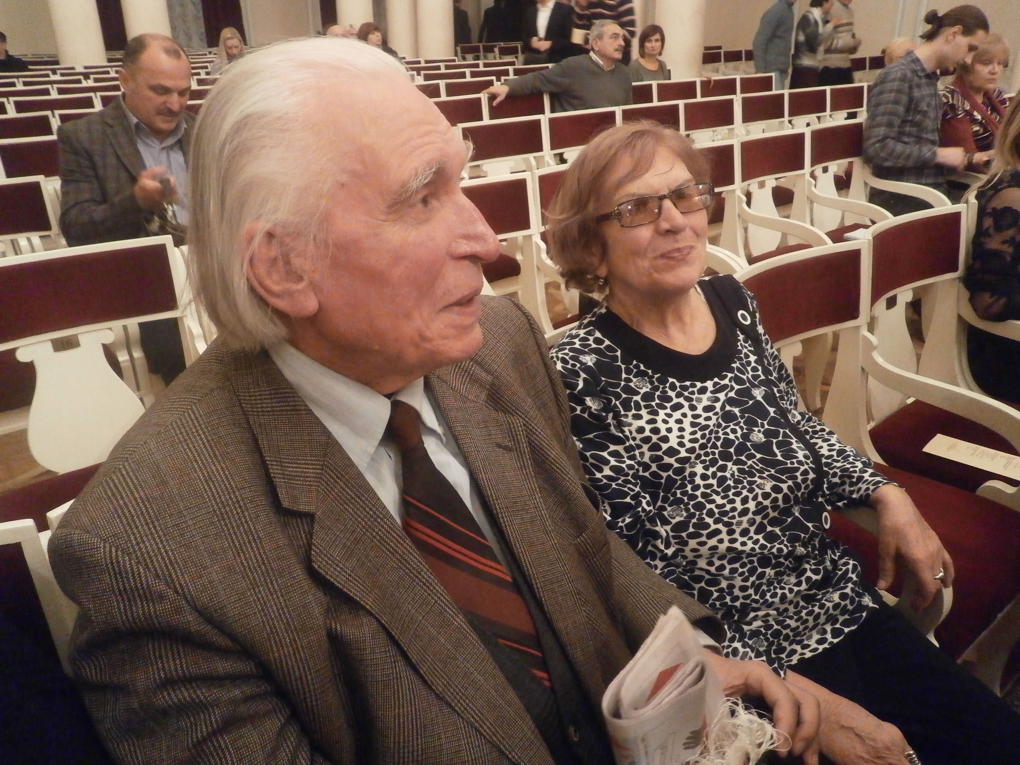 Левко і Жанна Колодуби на відзначенні 85-річчя від дня народження. Колонна зала імені Лисенка Національної філармонії України, 8 листопада 2015.